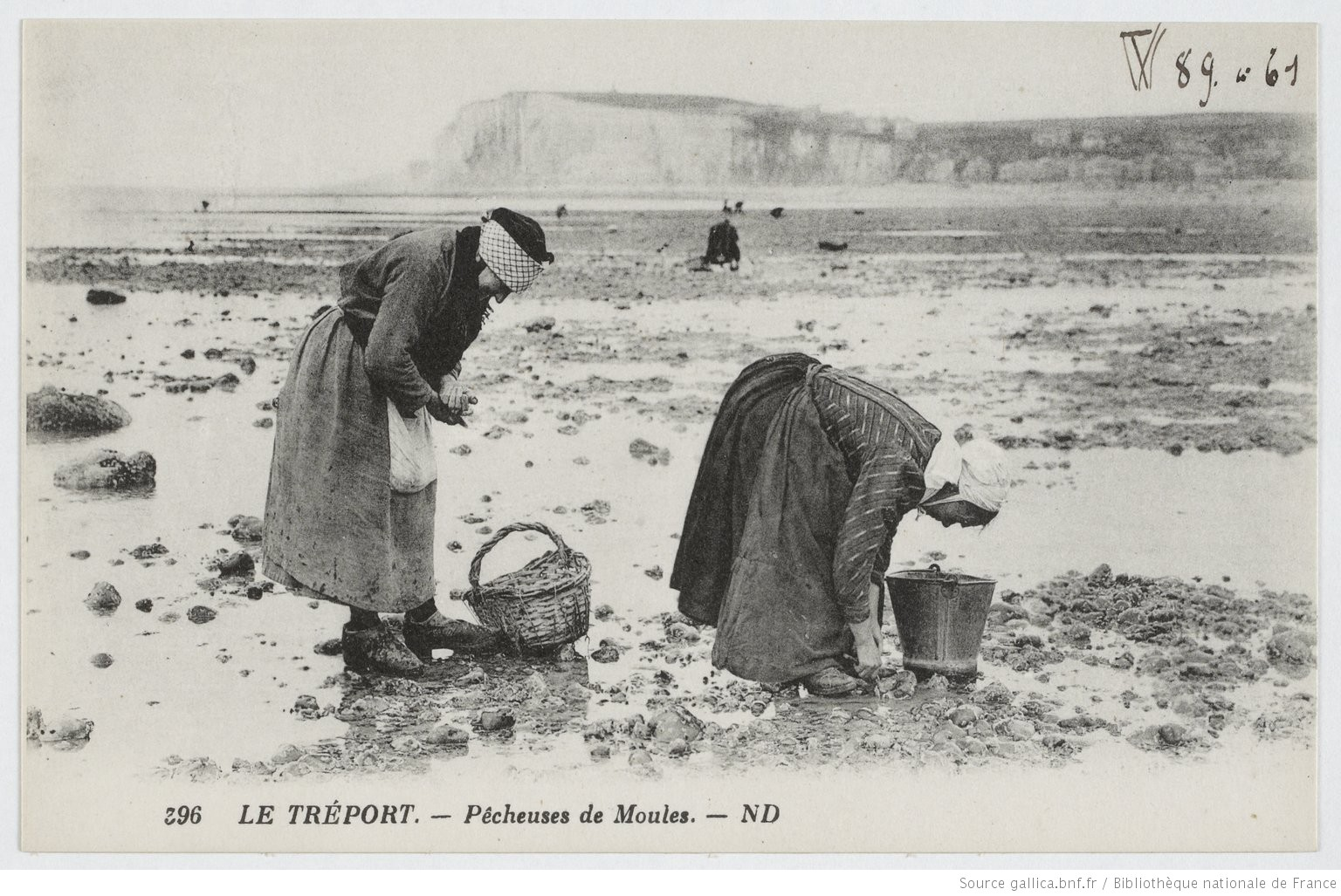 Carte postale montrant des femmes pêchant des moules au Tréport